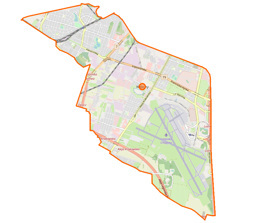 Mapa dzielnicy Włochy This map may be incomplete, and may contain errors. Don't rely solely on it for navigation.